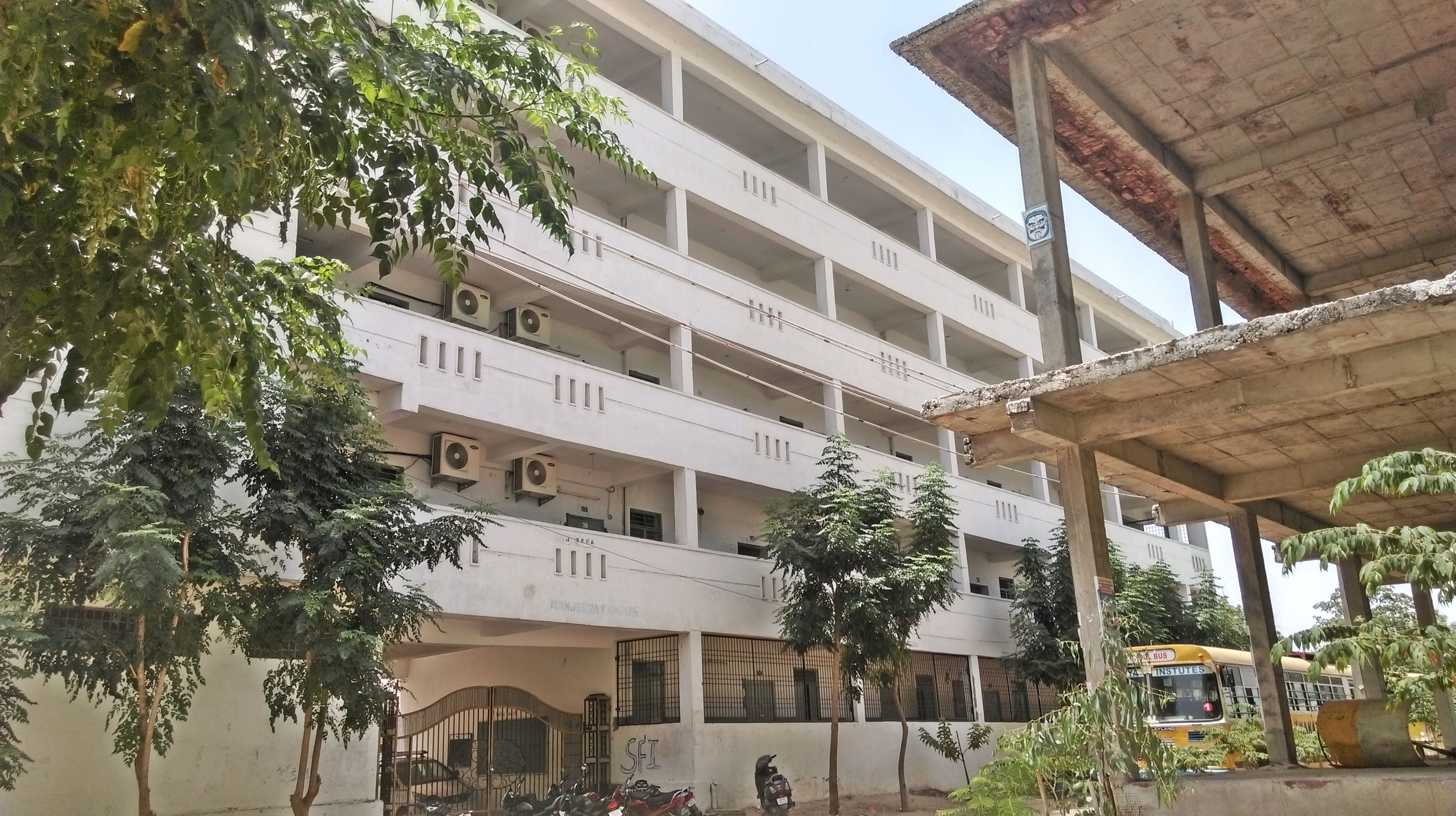 Kakatiya High School (Kakatiya Institutions) in Nizamabad city of Telangana state,India. Other information No